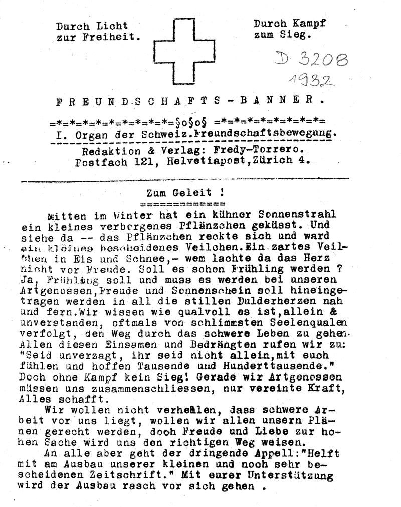 Titelblatt Erstausgabe Freundschaftsbanner